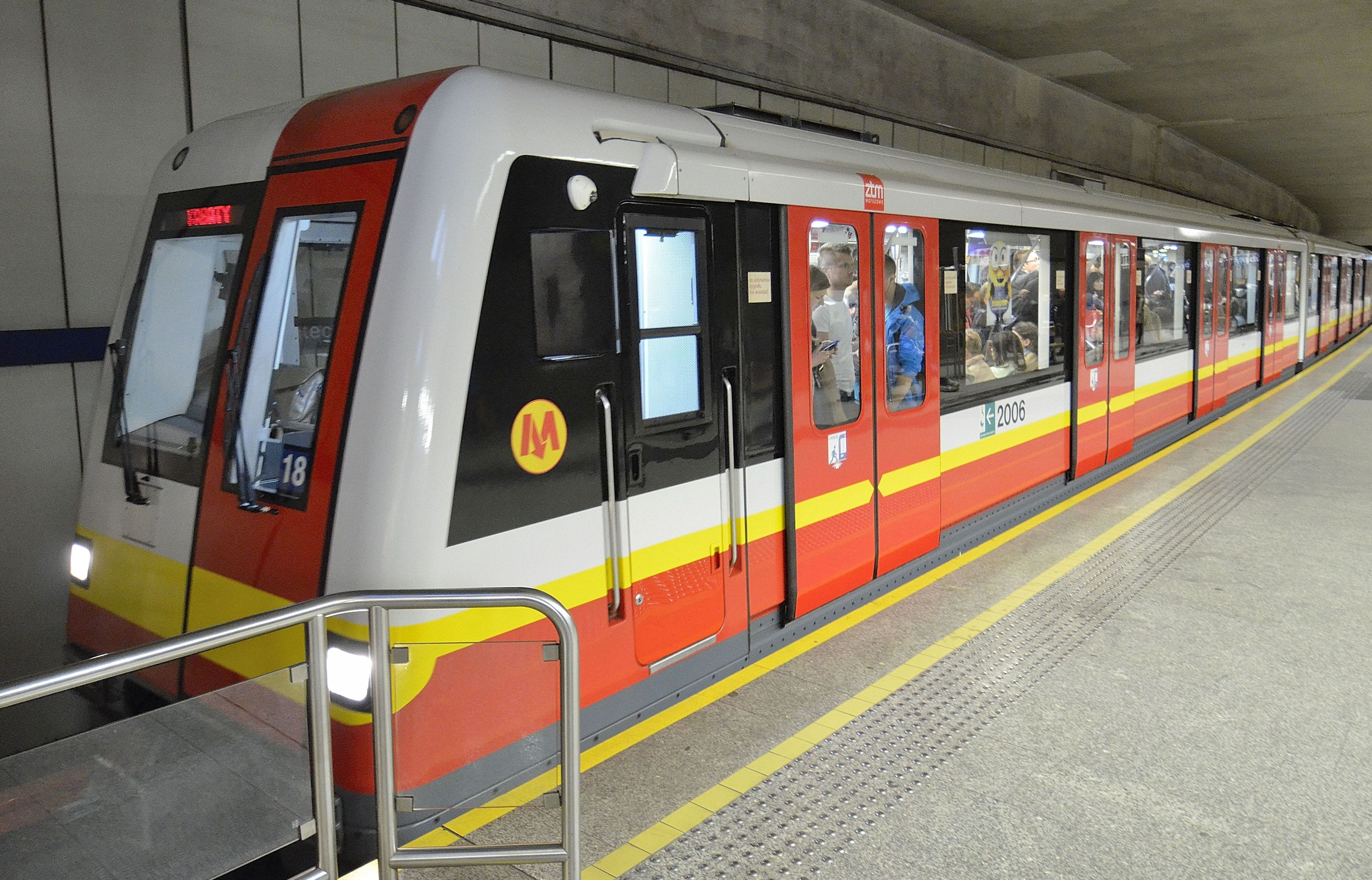 Pociąg Alstom Metropolis 98B po rebrandingu na stacji metra Politechnika